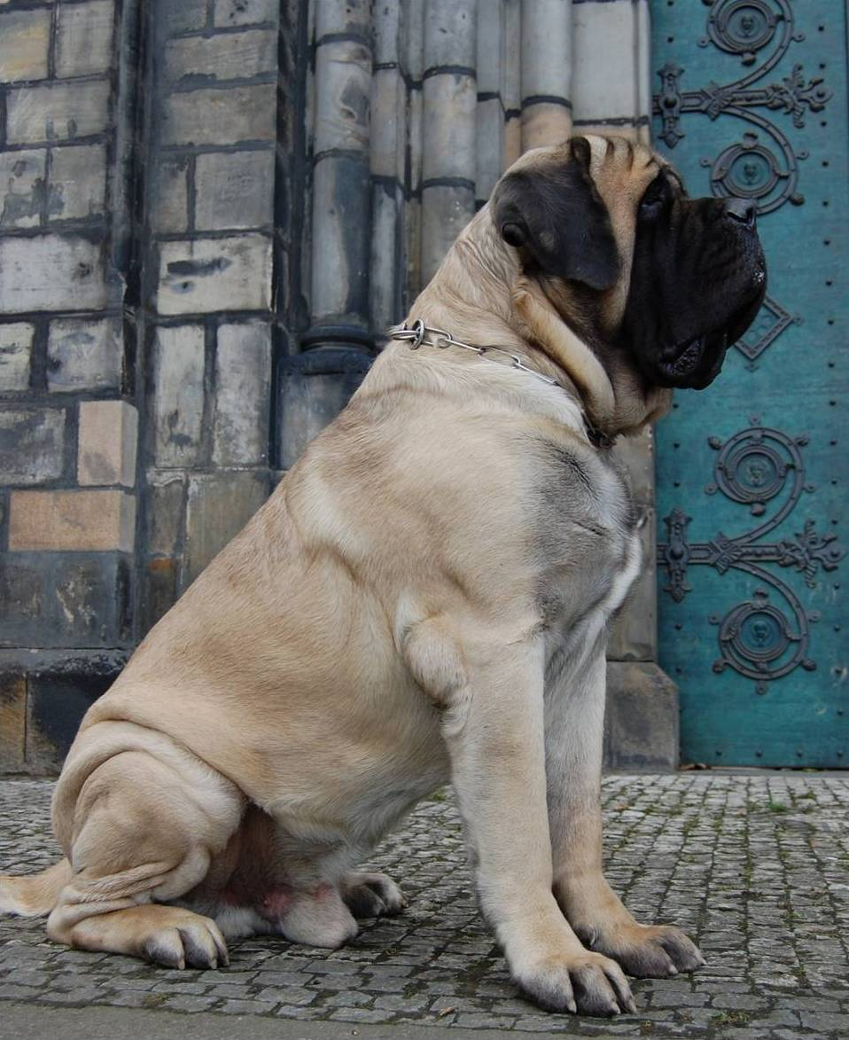 Anglický mastif ICh. Westgort Anticipation